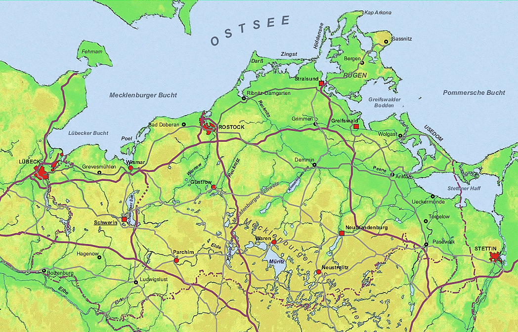 Übersichtskarte von Mecklenburg-Vorpommern